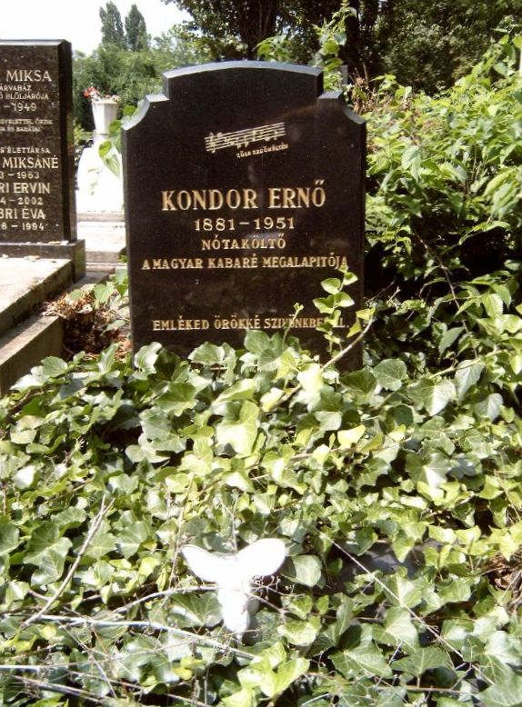 Kondor Ernő (Balassagyarmat, 1884. márciusw 26. – Budapest, 1951. március 17.) színész, kabaréigazgató, nótaszerző sírja Budapesten. Kozma utcai izraelita temető: 1C-6